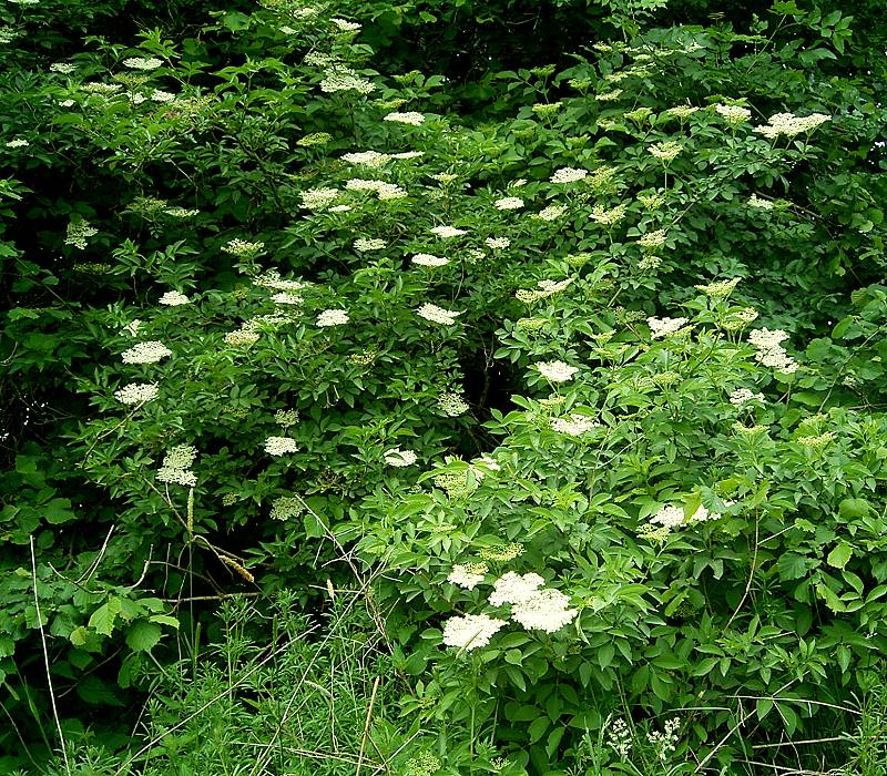 Sambucus nigra